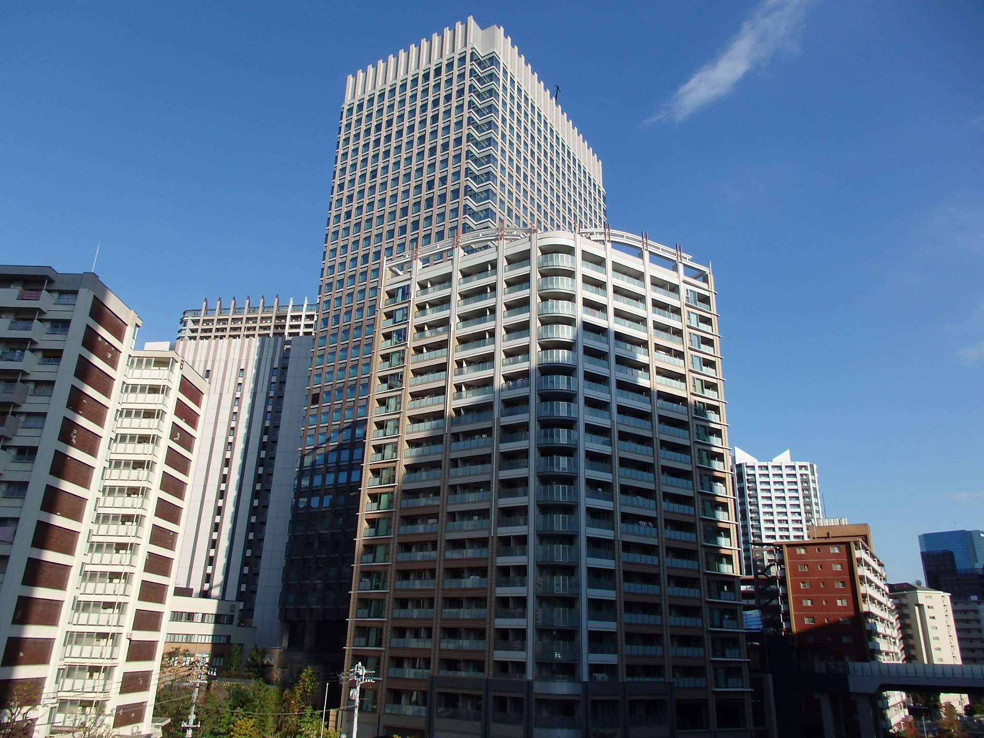 パークシティ大崎ザ レジデンス